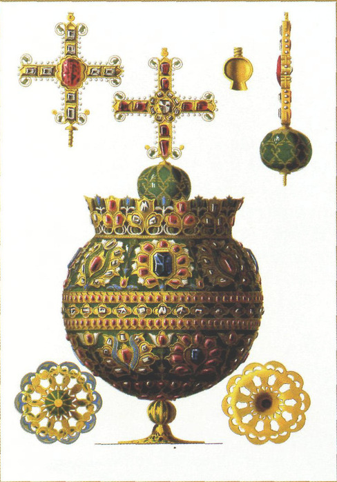 Держава грецької справи. Малюнок середини XIX ст.